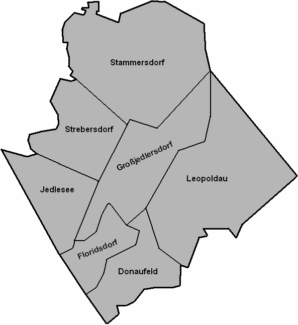 Bezirksteile von Floridsdorf